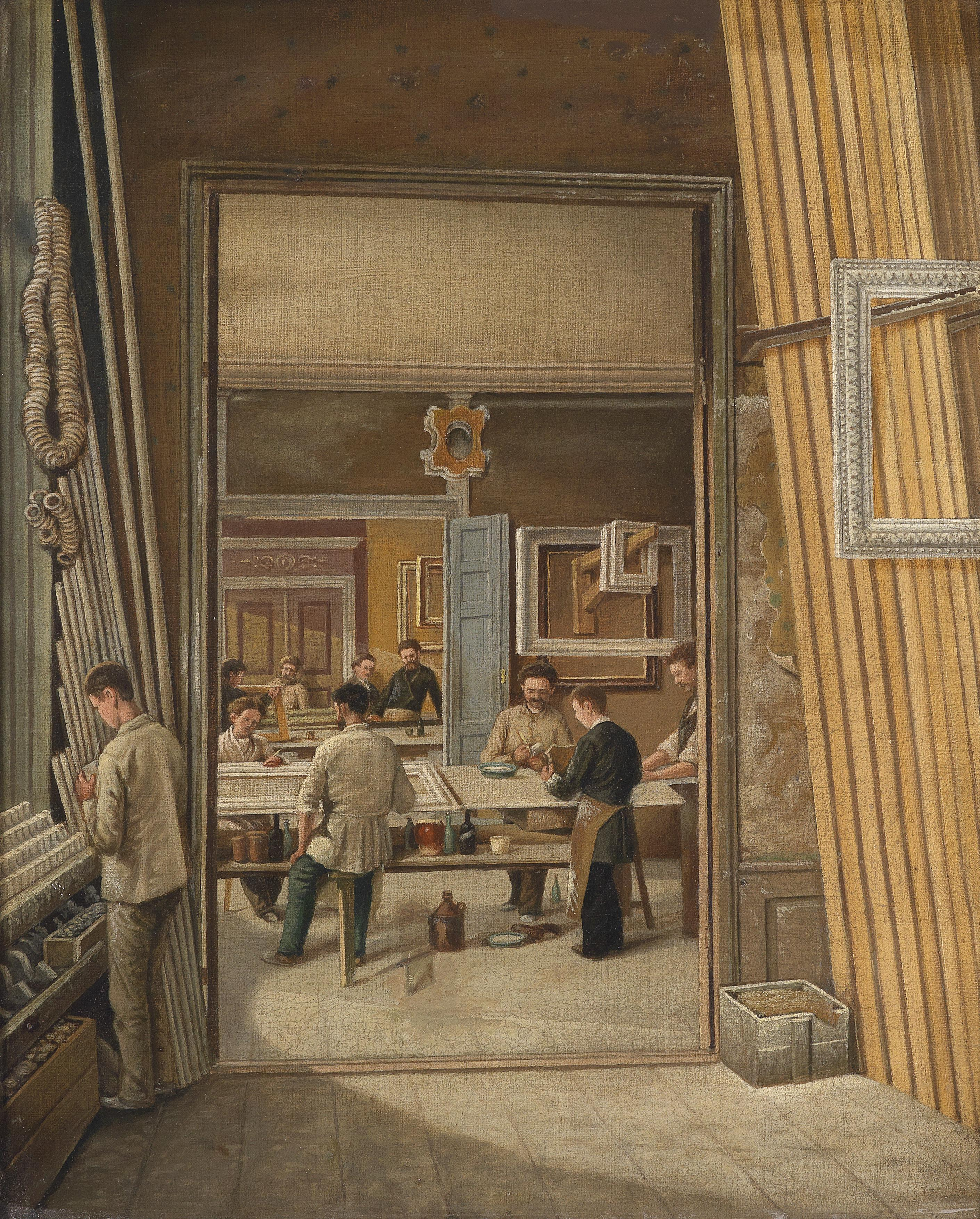 Blick in eine Rahmenmacherwerkstatt, Öl auf Leinwand, 46 x 37 cm